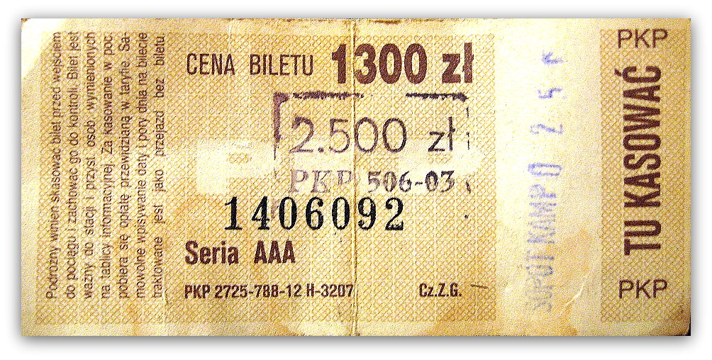 Bilet SKM z lat 90. XX wieku (sprzed denominacji złotego w 1995) (1300 zł przebite na 2500 zł), skasowany na przystanku Sopot Kamienny Potok